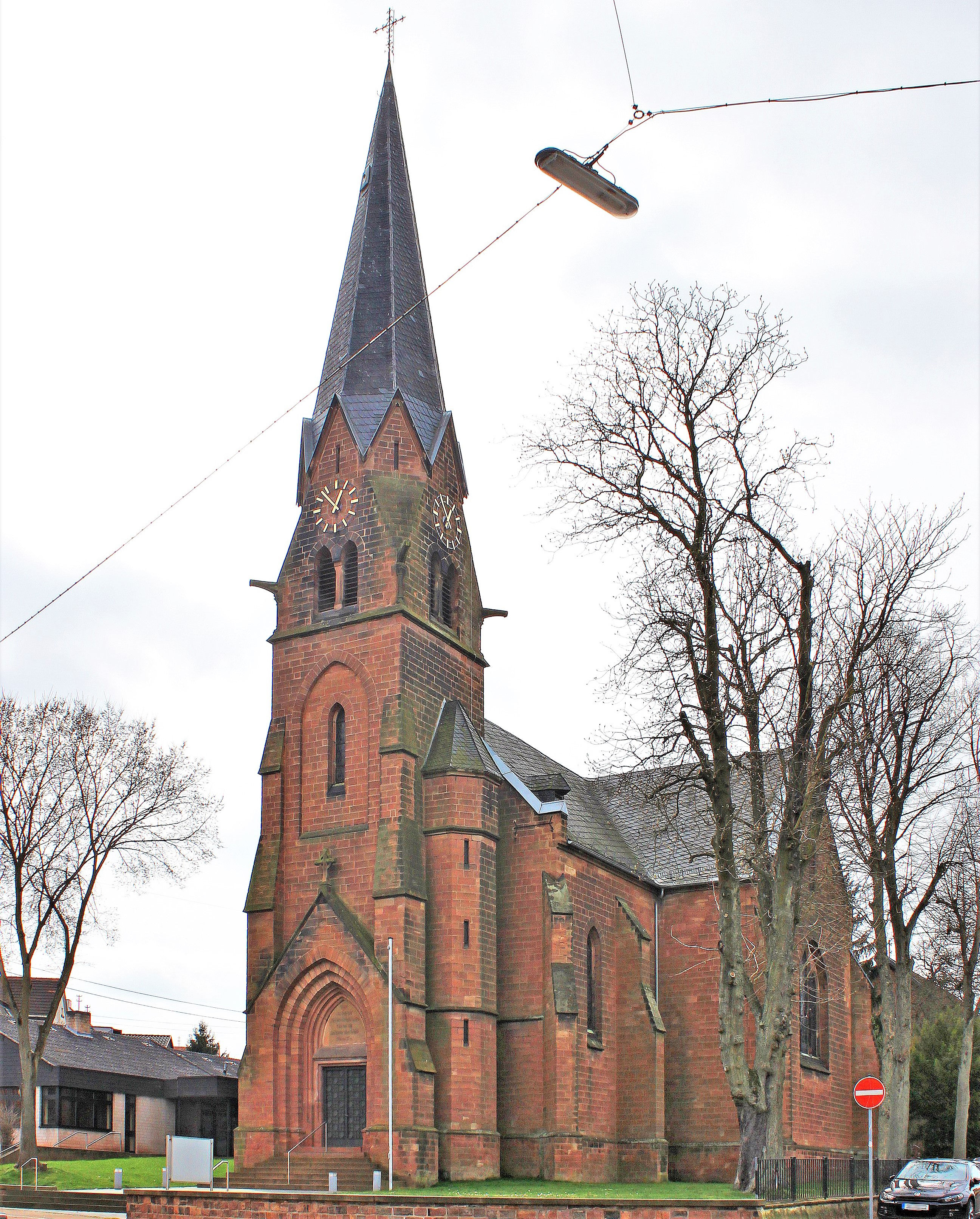 Die evangelische Kirche in Riegelsberg, Regionalverband Saarbrücken, Saarland